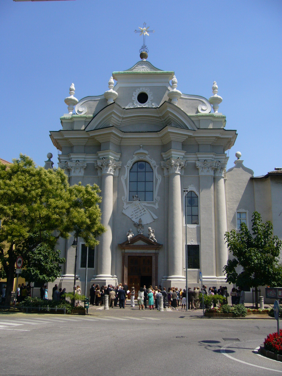 Klosterkirche Muri Griess in Bozen